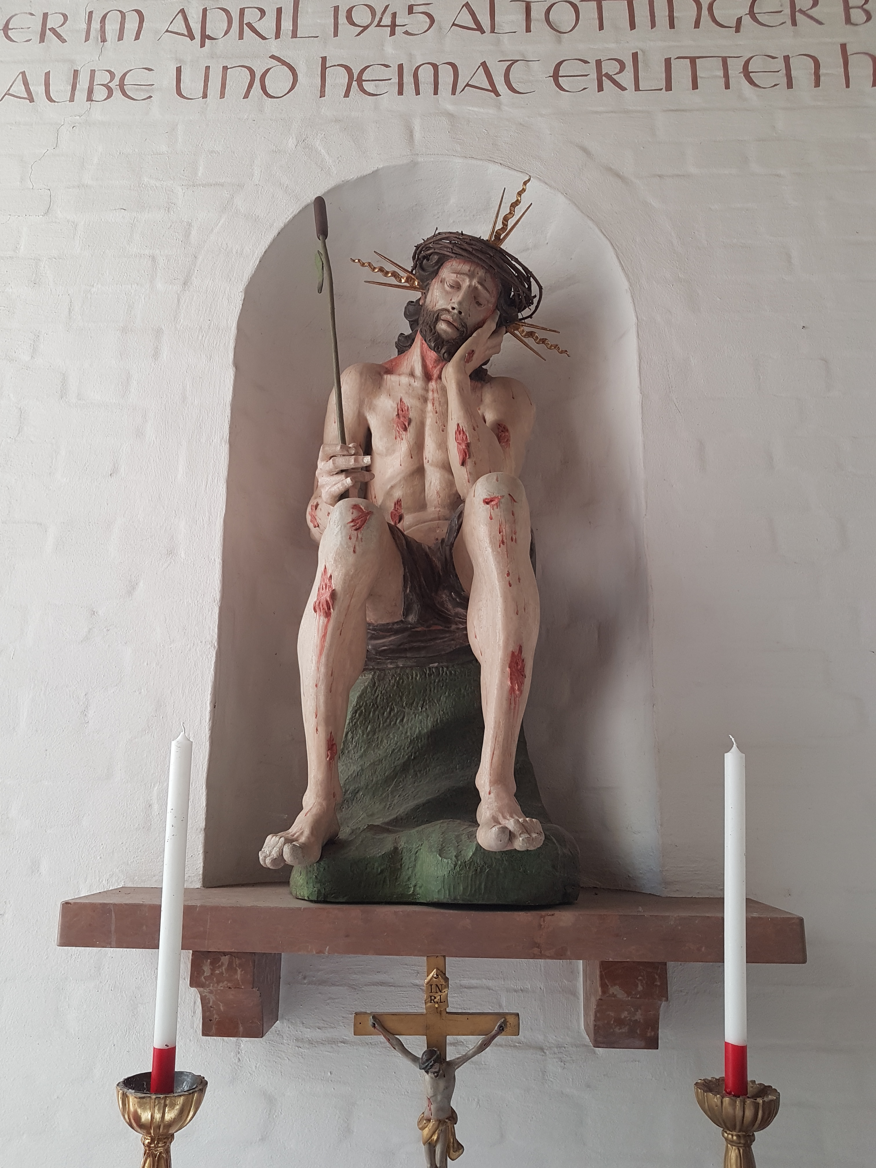 Augustiner-Chorherrenstift Altötting